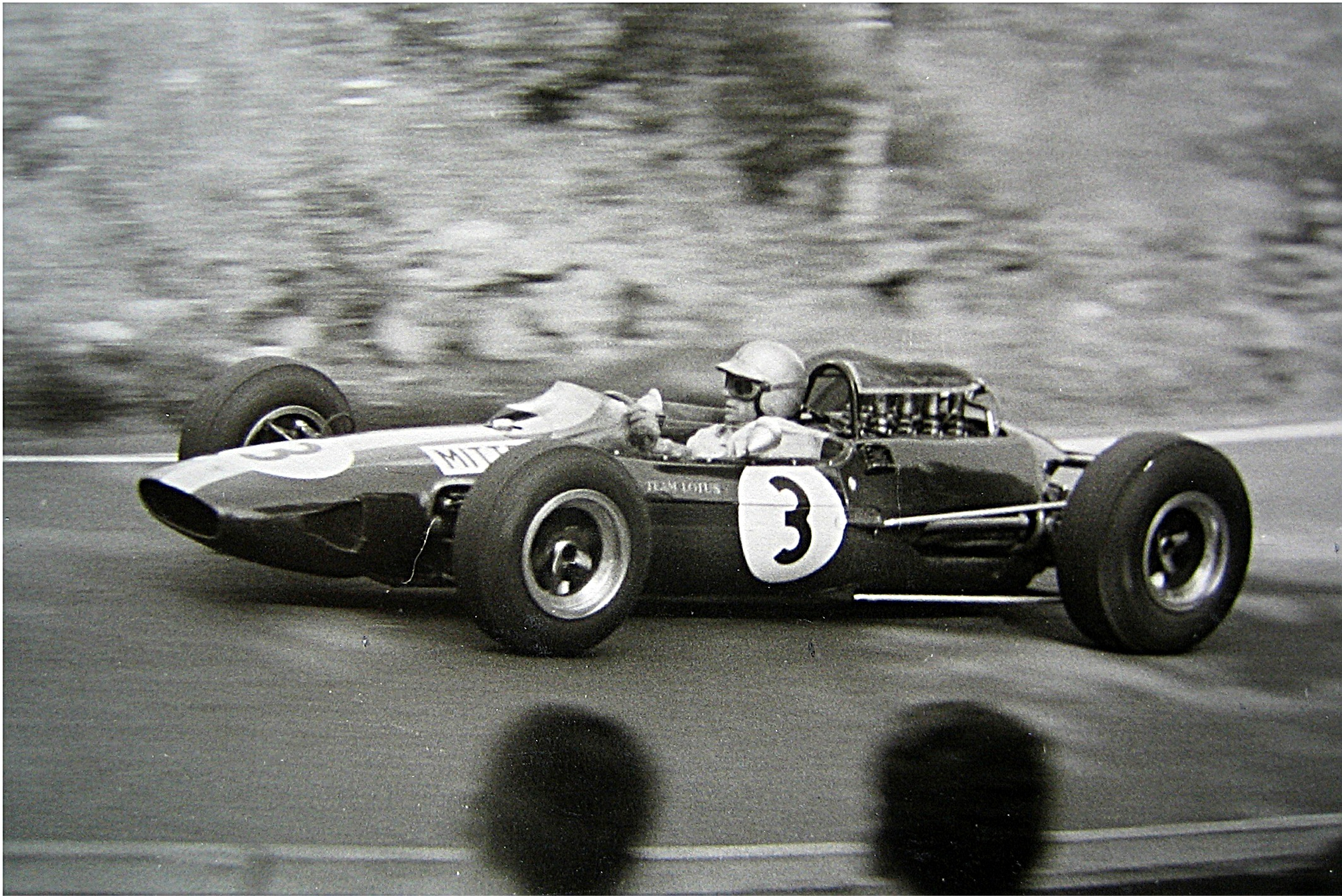 Bildbeschreibung: Gerhard Mitter beim Großen Preis von Deutschland 1965 auf Lotus 25 Fotograf: Lothar Spurzem Datum: 01.08.1965 in der Südkehre des Nürburgrings